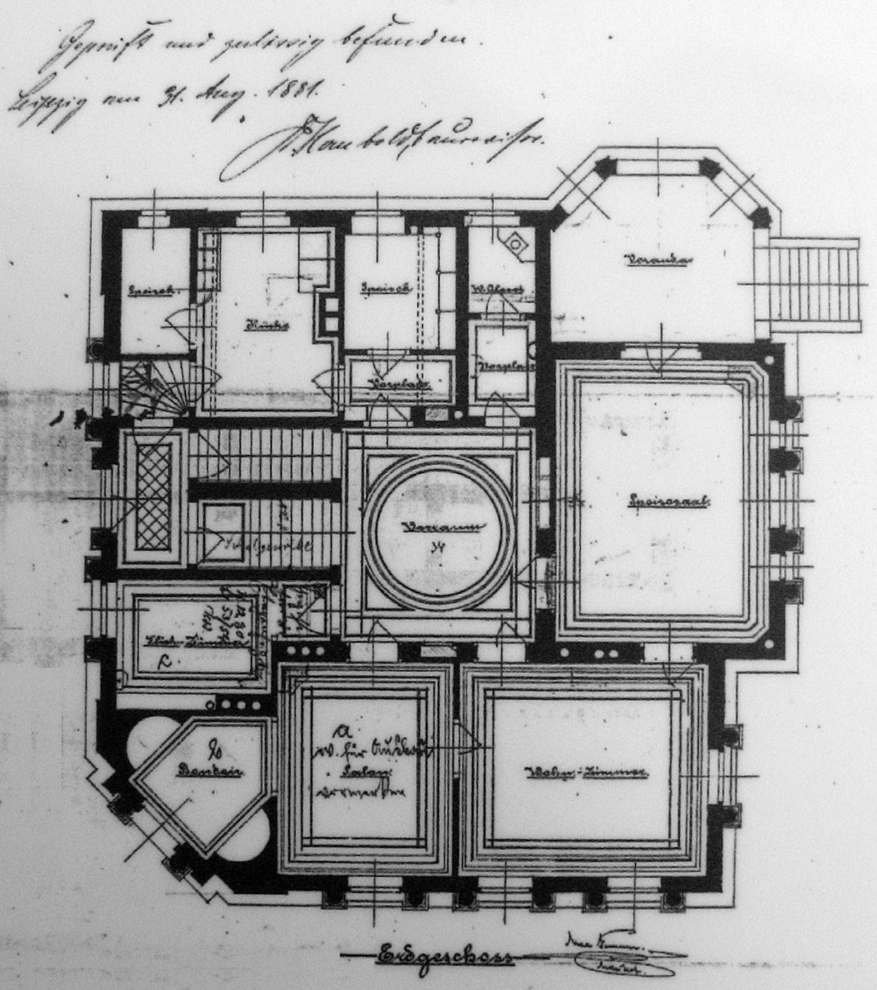 Villa Leipzig, Sebastian-Bach-Straße 3, erbaut 1881–83 von M. Pommer, Grundriss aus der Bauakte